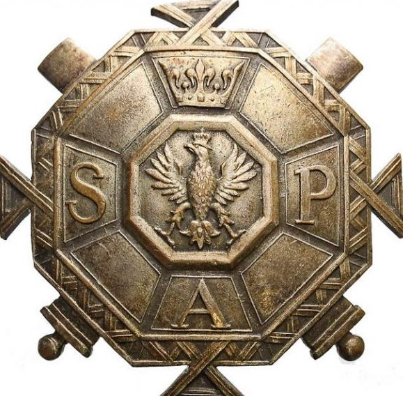 Odznaka absolwenta Szkoły Podchorążych Artylerii